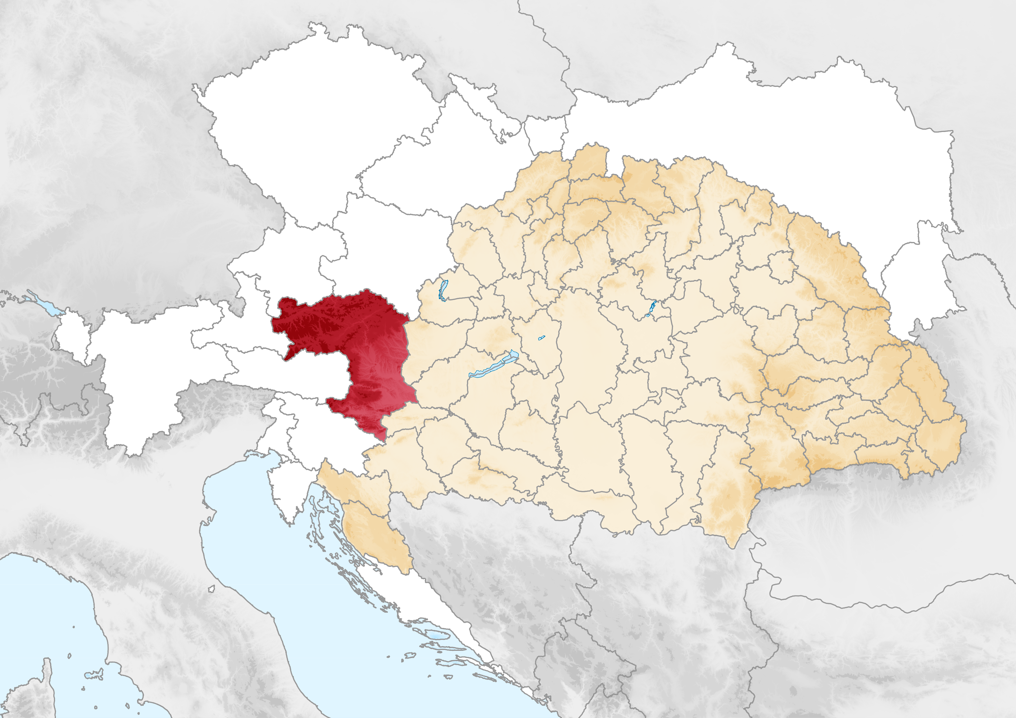 Carte de la Styrie en 1914